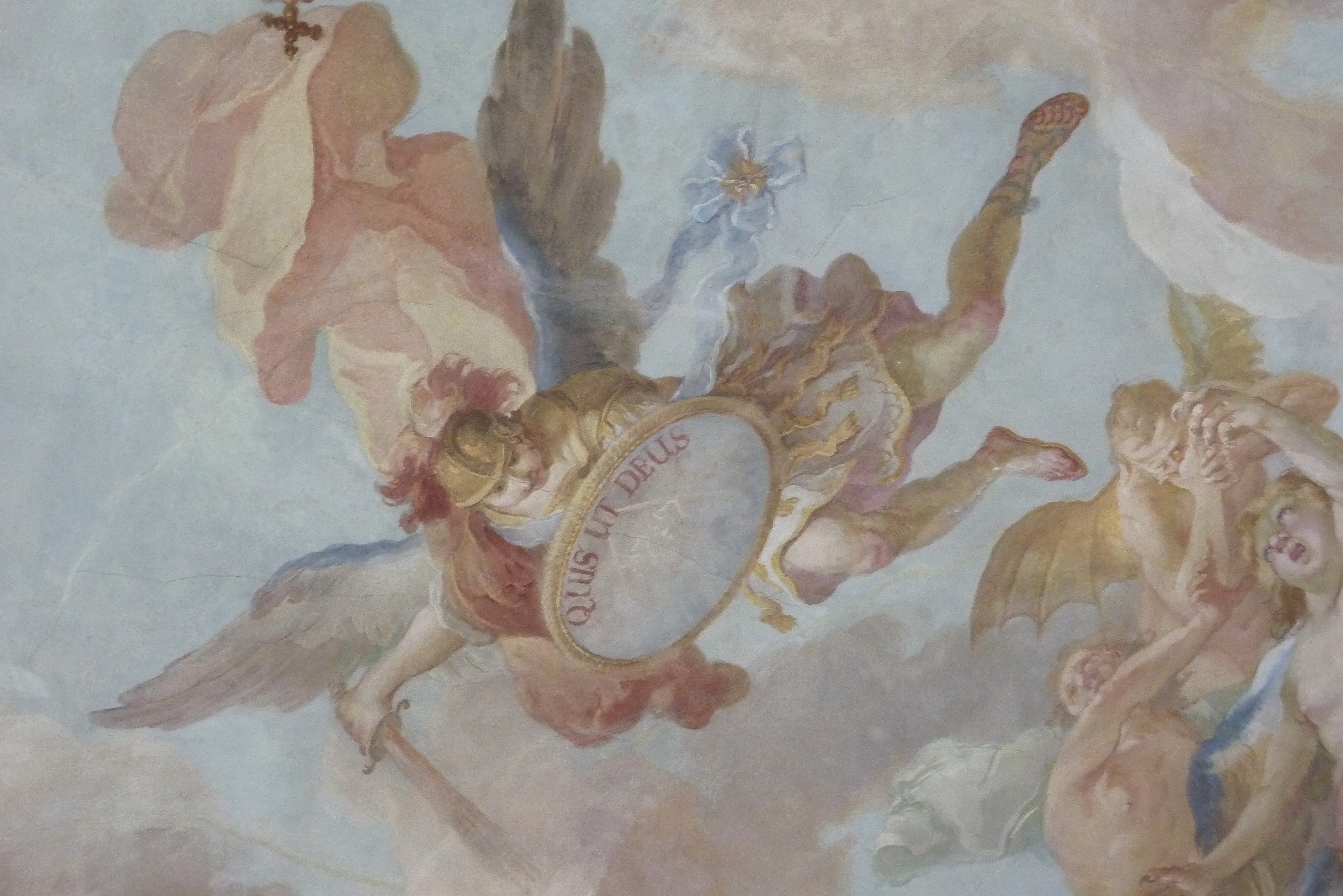 Katholische Pfarrkirche St. Michael in Lutzingen, einer Gemeinde im Landkreis Dillingen an der Donau (Bayern), Deckenfresko des Langhauses mit der Darstellung des hl. Michael, auf dem Schild Inschrift: QUIS UT DEUS (wer ist wie Gott)